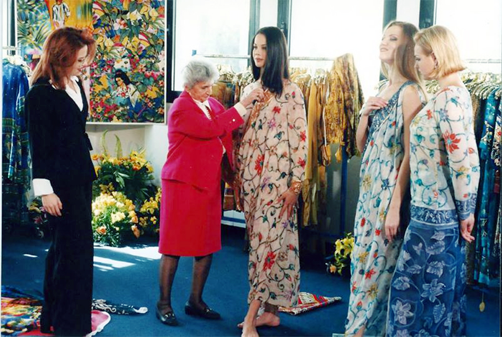 לאה גוטליב באולם התצוגה של מפעל "גוטקס"